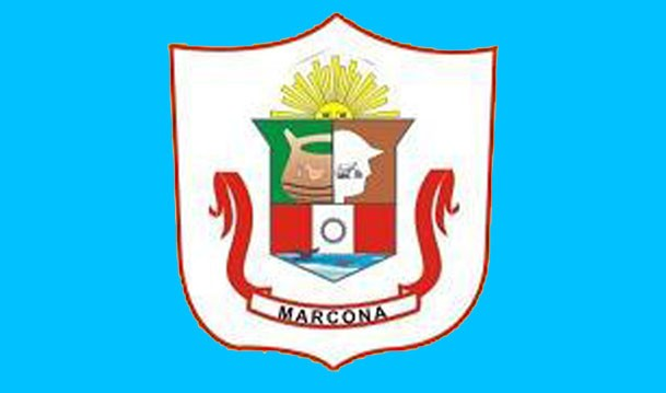 Bandera de Marcona